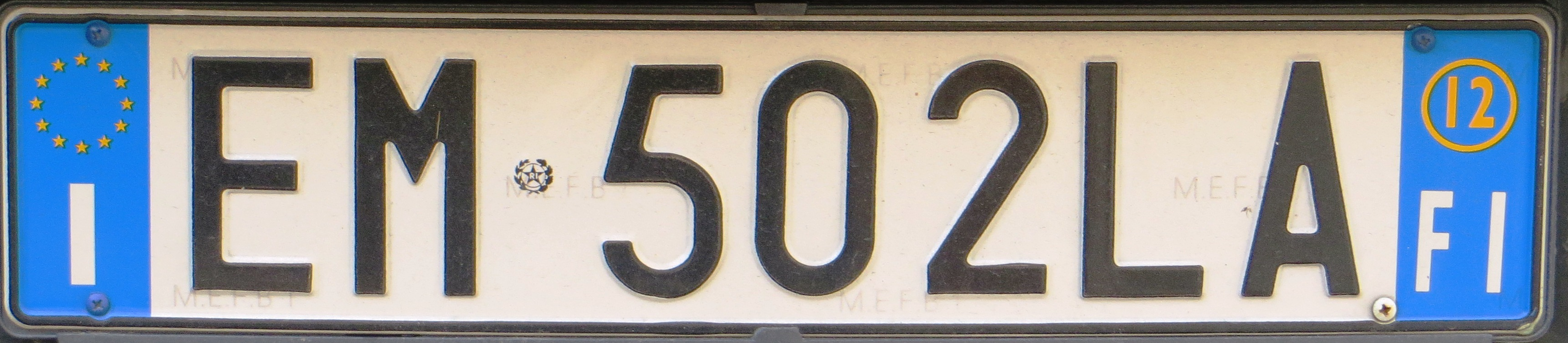 kentekenplaat uit Florence